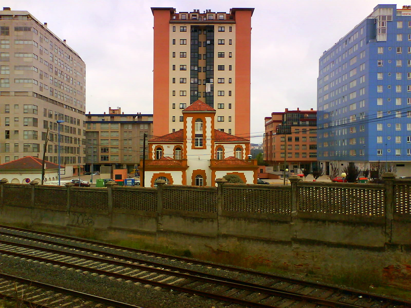 O Burgo, perspectiva simétrica